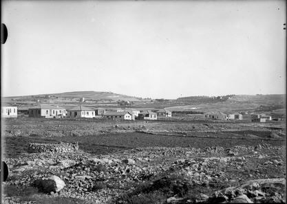 ירושלים - מראה כללי של שכונת מקור-חיים.